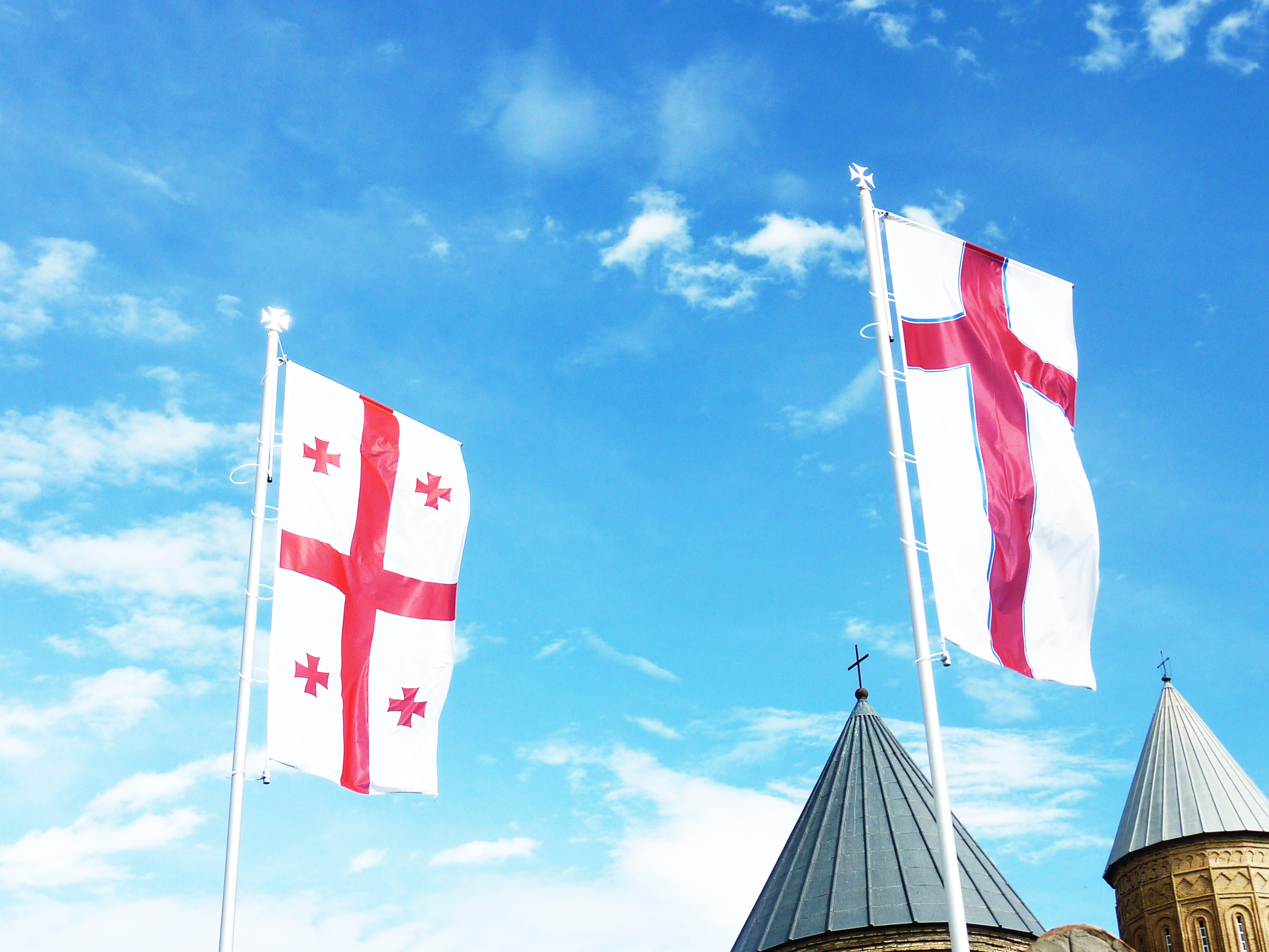 Les deux drapeaux de la Géorgie: celui de l'Etat et celui de la religion (à l'entrée du monastère d'Alaverdi)